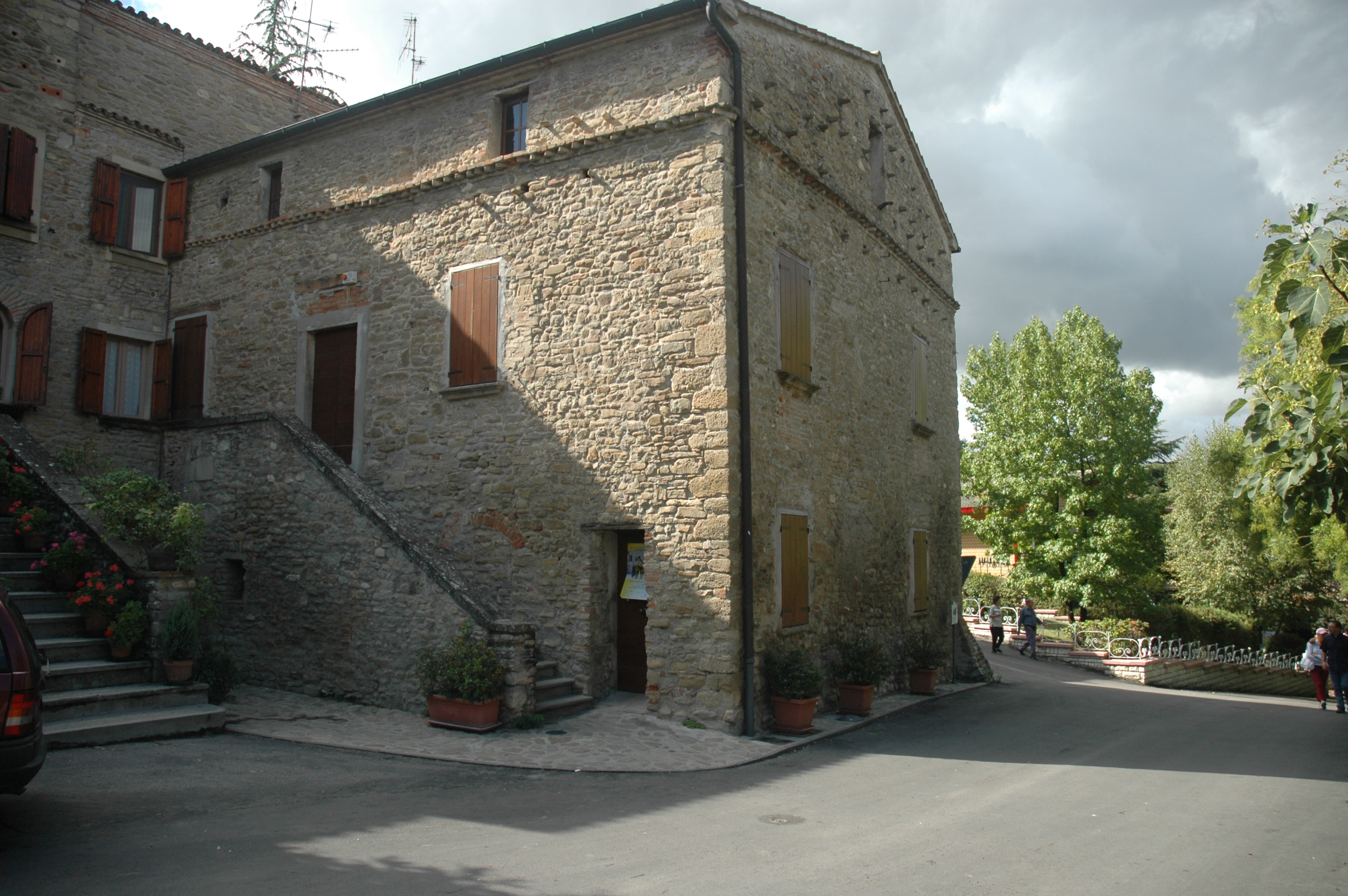 La casa natale dei fratelli Mussolini a Predappio, attualmente non visitabile e oggetto di mostre saltuarie.